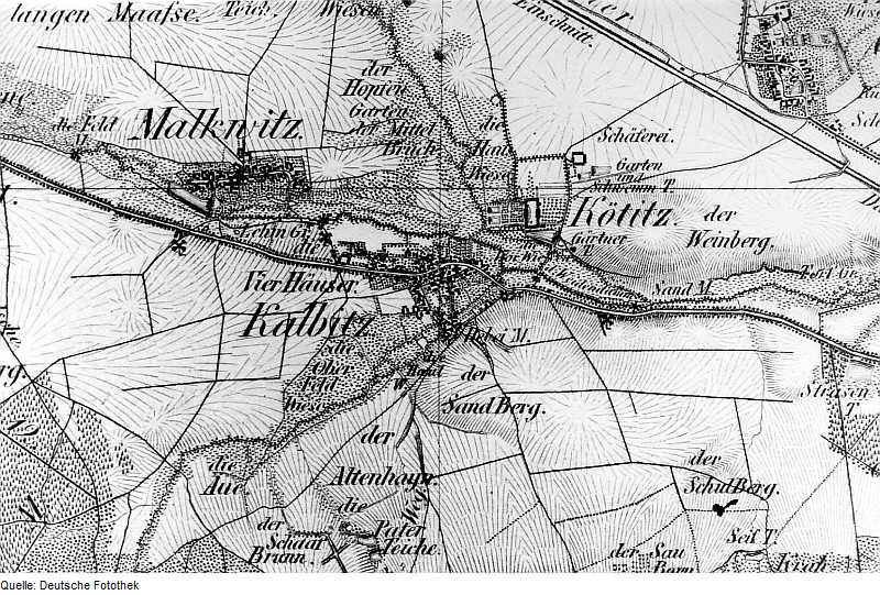 Original image description from the Deutsche Fotothek Wermsdorf-Calbitz. Oberreit, Sect. Oschatz, 1839/40